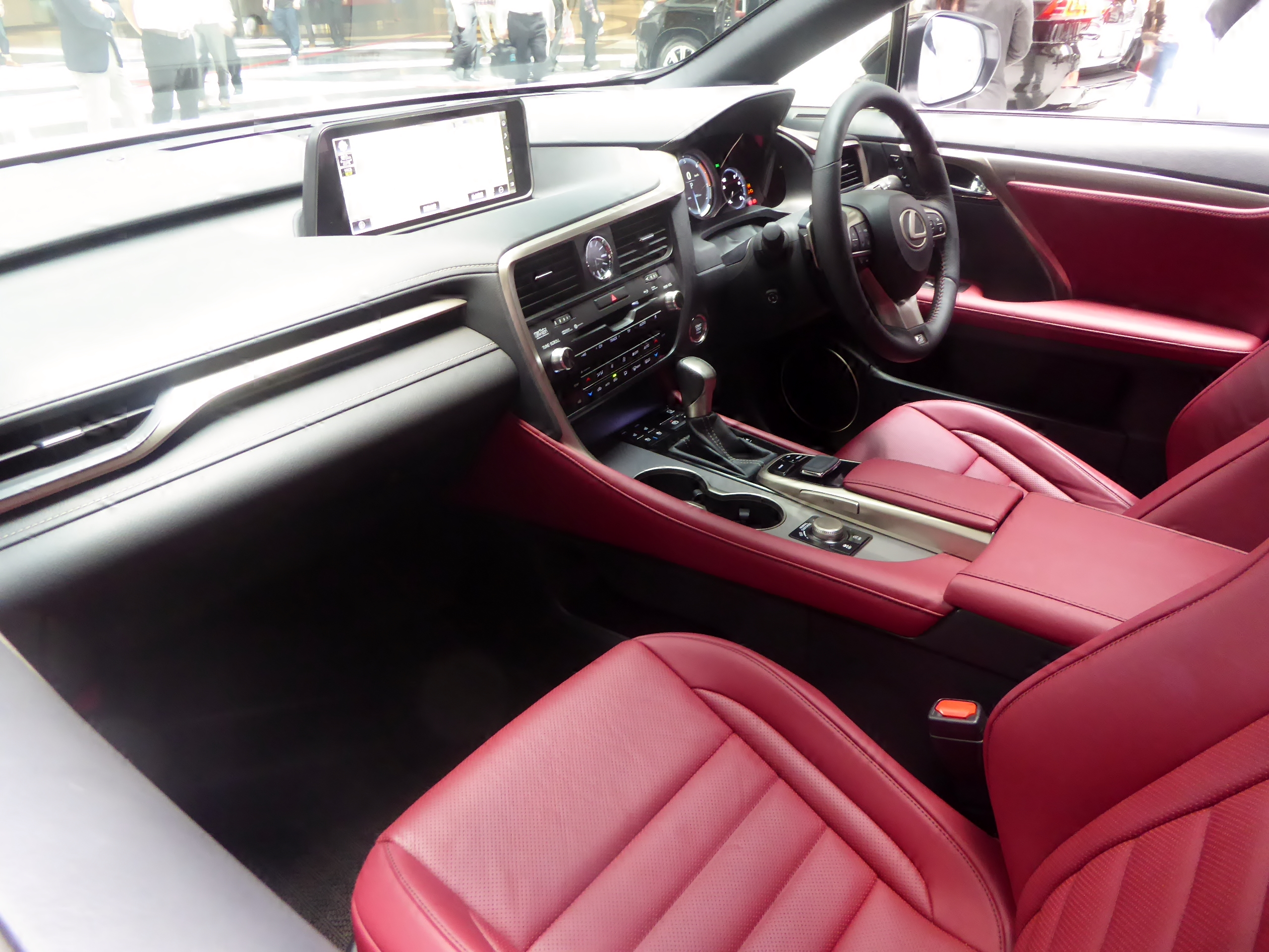 4代目レクサス・RX200t Fスポーツのプロトタイプのインテリアを撮影。